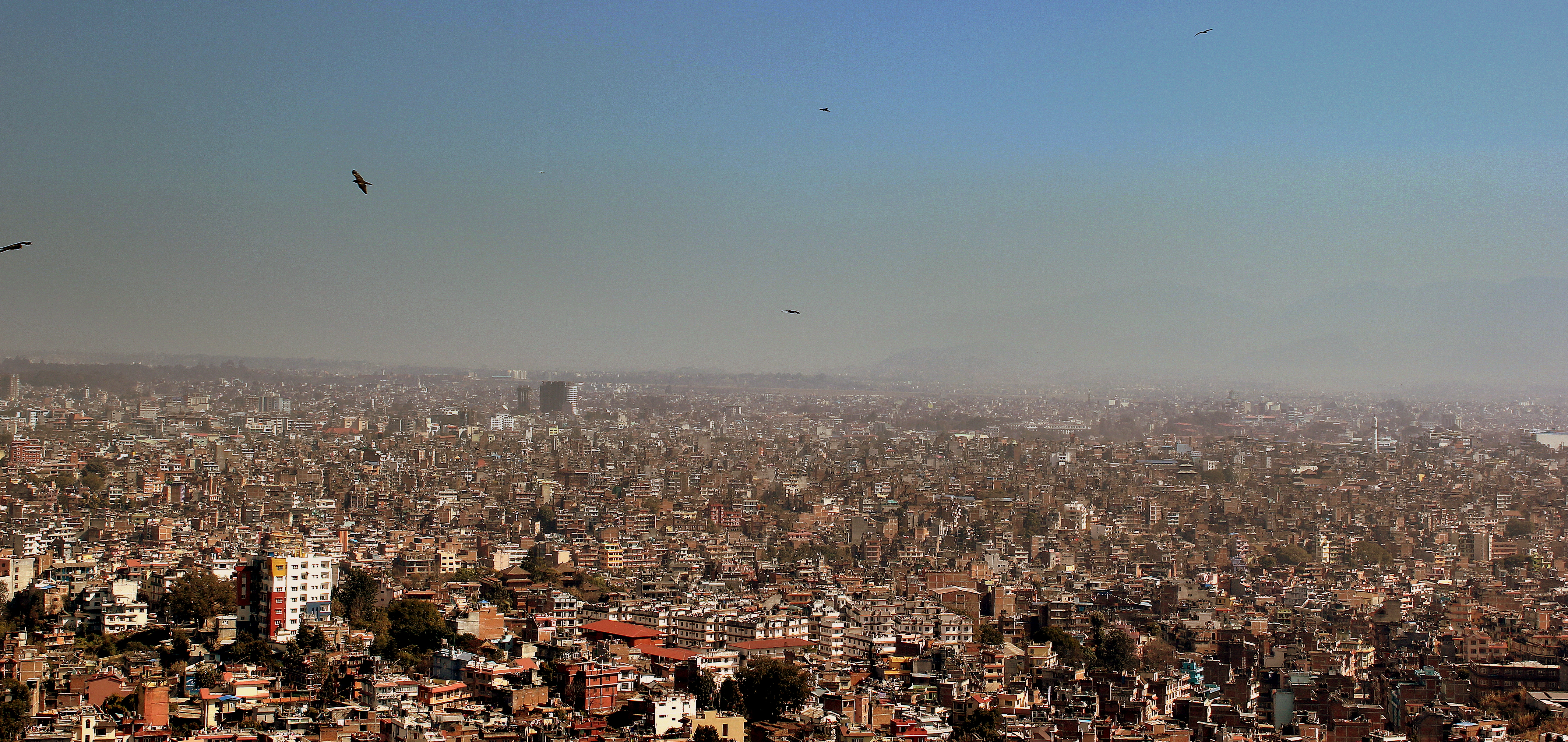 BUZZARDS FLYING HIGH OVER KATHMANDU NEPAL FEB 2013